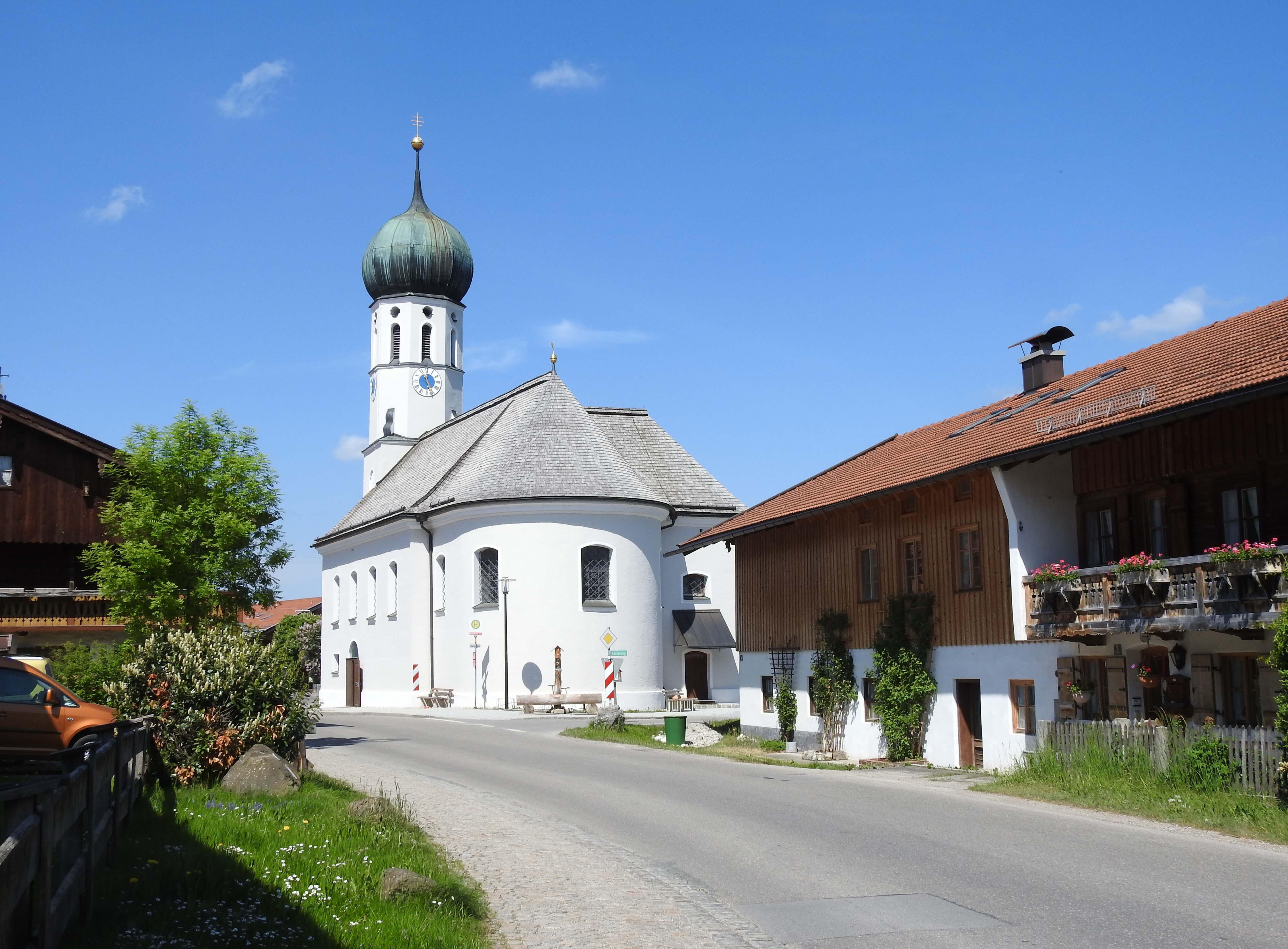 Kirche in Greiling von Osten